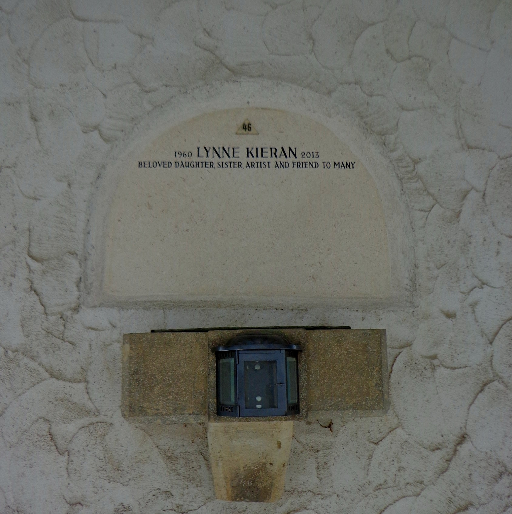 Feuerhalle Simmering - Arkadenhof (Abteilung ARI) - Urnengrab der Sängerin Lynne Kieran, Mitglied der "Rounder Girls"